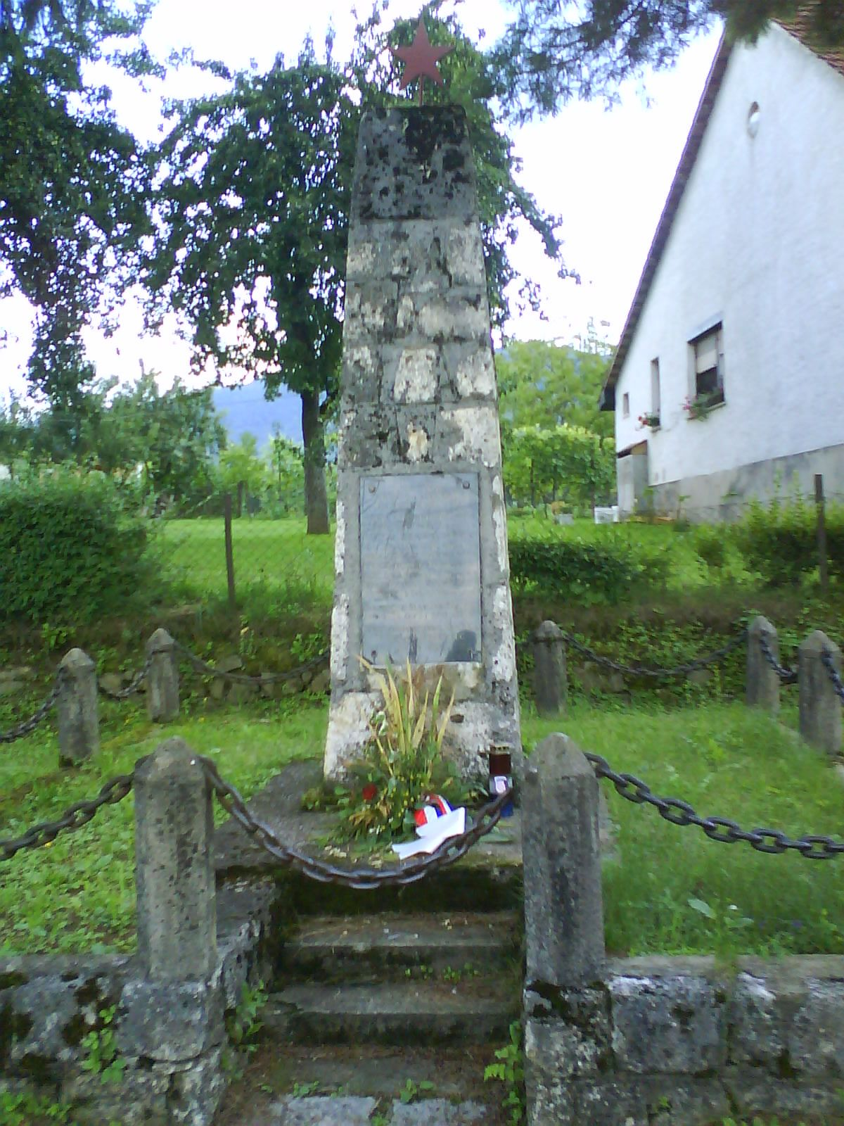 Spomenik NOR-u